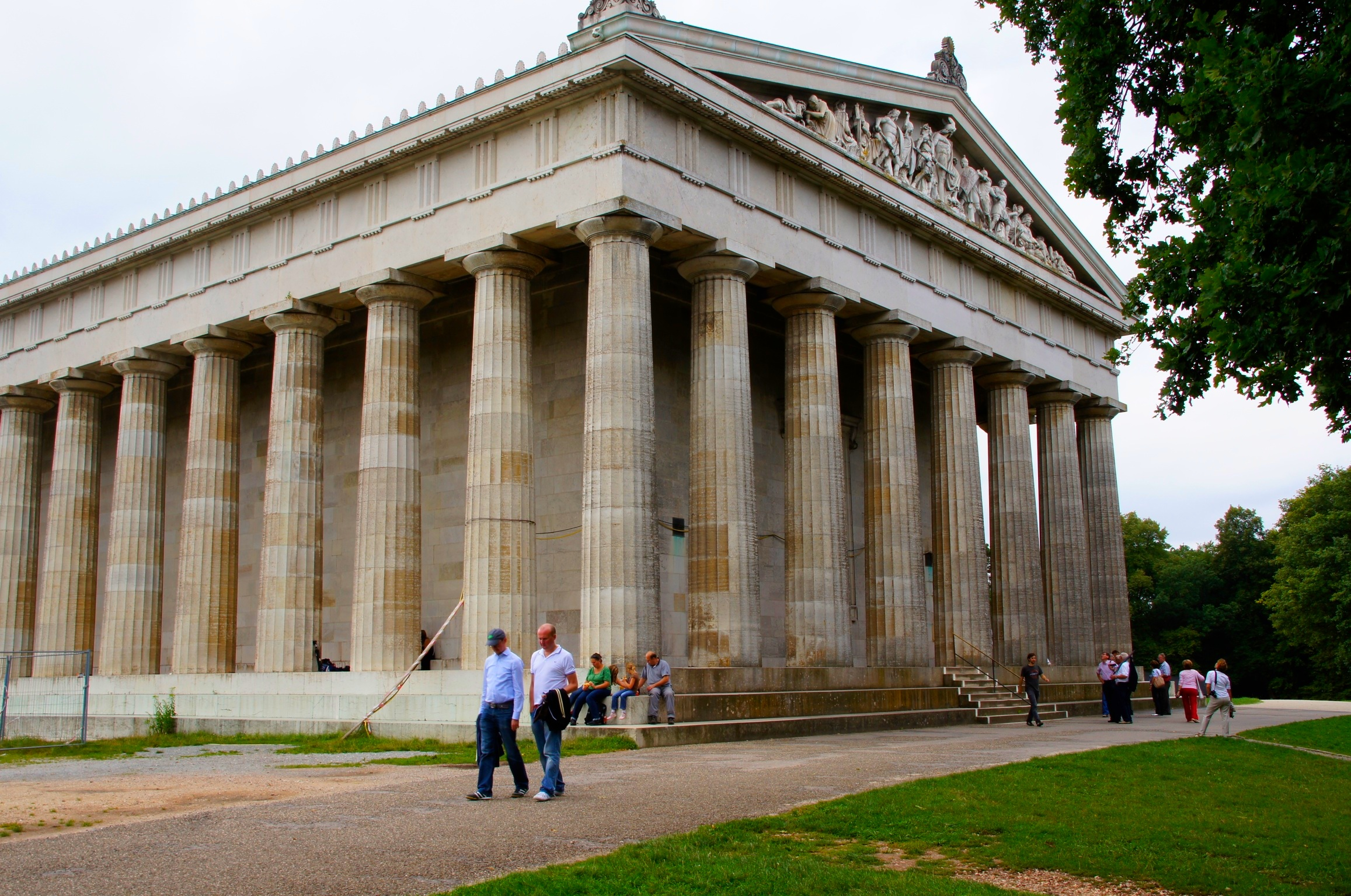 Die Walhalla ist eine Ruhmeshalle berühmter und ausgezeichneter Persönlichkeiten deutscher Sprache. 'Teutscher Zunge zu seyn, wird erfordert, um Walhallas Genosse zu werden' Originalton des Kronprinzen Ludwig von Bayern. Dieser Ludwig von Bayer ließ als König Ludwig I von Bayern die Ruhmeshalle hoch über der Donau bei Regenstaufen, Kreis Regensburg im Stile eines griechischen Tempels ( Panthenon) erbauen und eröffnete sie 1842 am Jahrestag der Völkerschlacht bei Leibzig. Bei der Eröffnung wurden 160 Personen mit Büsten, bzw. wenn eine authentische Abbildung des Gesichtes fehlte, mit Gedenktafel geehrt. Der Namenvorschlag Walhalla stammt vom Schweizer Geschichtsschreiber Johannes von Müller, der auch bei der Auswahl der Persönlichkeiten beteiligt war. Johannes Heribert Pohl